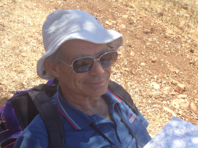 חוקר המערות פרופסור עמוס פרומקין בטיול